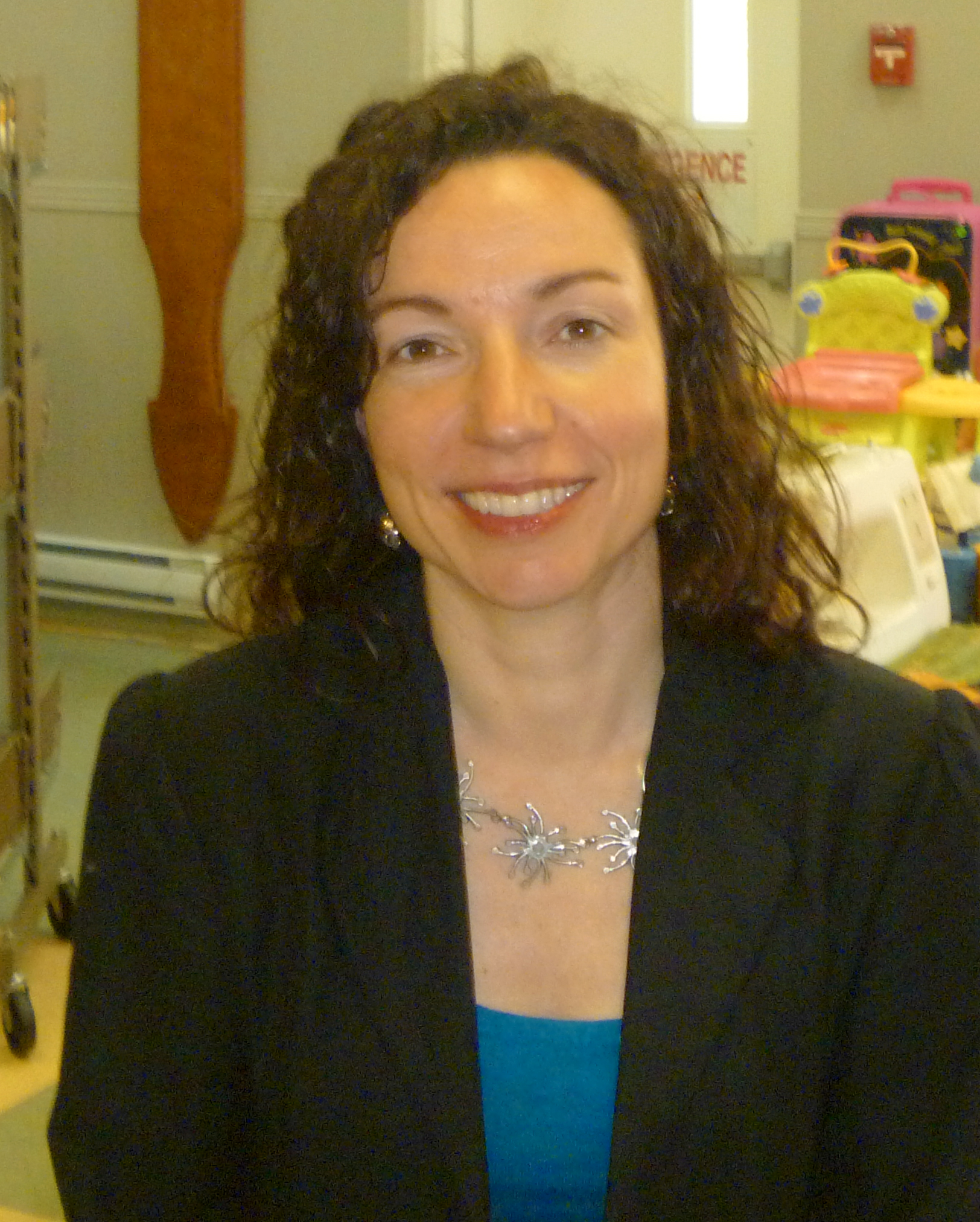 Martine Ouellet. Députée du Parti Québécois